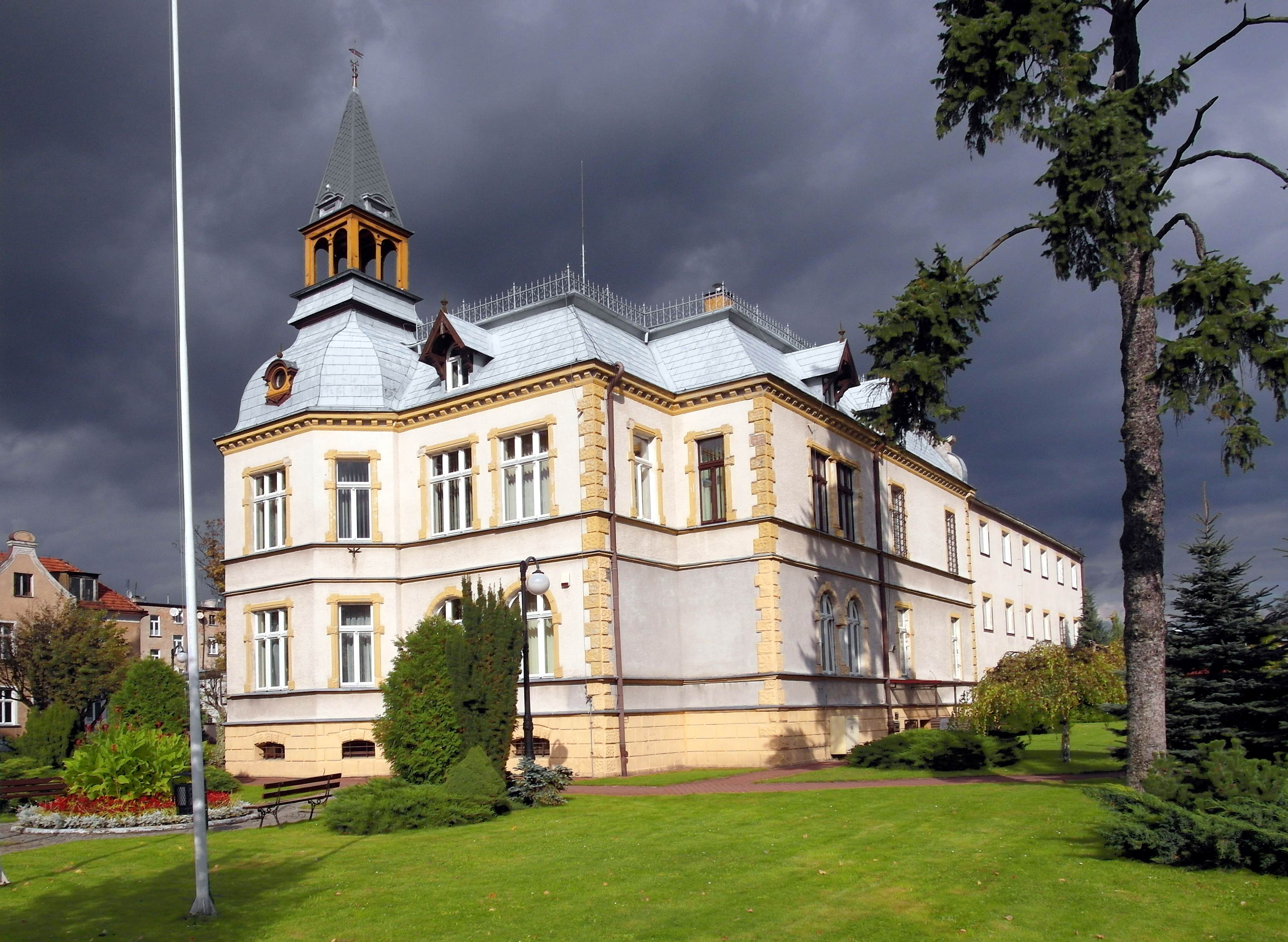 Dębno, willa, obecnie ratusz, ul. Józefa Piłsudskiego 5